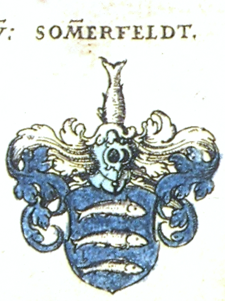 Stammwappen derer von Sommerfeld (und/auf Falkenhayn); in: Johann Siebmacher: New Wappenbuch; eingescannt aus: Horst Appuhn (Hrsg.), Johann Siebmachers Wappenbuch. Die bibliophilen Taschenbücher 538, 2. verbesserte Auflage , Dortmund 1989 Schlesische [Ritterschaft und Adel], Blatt 060